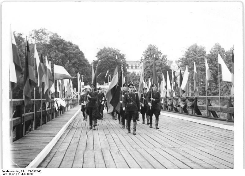 ADN-ZB-Illus-Klein-7.7.50- Feierliche Unterzeichnung des Abkommens über die deutsch-polnische Friedensgrenze. Im Haus der Kultur in Zgorzelec, der an der Lausitzer Neisse gelegenen Grenzstadt, fand am 6. Juli 1950 die Unterzeichnung des Abkommens über die Markierung der festgelegten und bestehenden deutsch-polnischen Staatsgrenze statt. Im Namen der Deutschen Demokratischen Republik unterzeichnete Ministerpräsident Otto Grotewohl, der mit einer starken Regierungsdelegation in Zgorzelec erschienen war, im Namen der Republik Polen unterzeichnete Ministerpräsident Cyrankiewicz. UBz.: Eine starke Delegation der deutschen Werktätigen, an der Spitze die Volkspolizei, begibt sich über die Neissebrücke in Görlitz in die polnische Grenzstadt Zgorzelec, um dem feierlichen Akt beizuwohnen. 7141-50